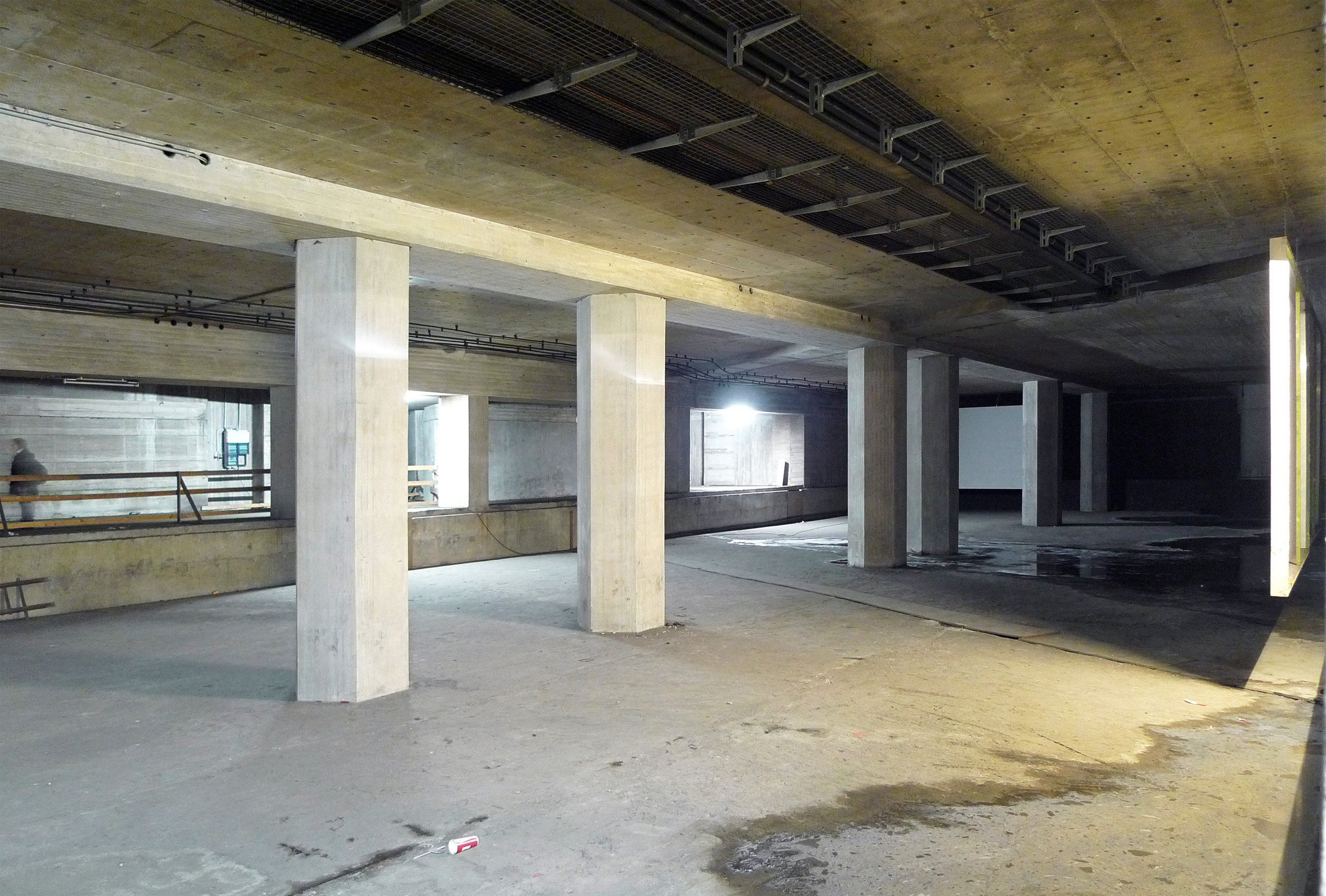 U-Bahn Station (Rohbau) am Hauptbahnhof in Hannover ("Geisterstation"), welche sich noch unter der bereits im Betrieb befindlichen Station für die Linien A und B befindet. Bauvorleistung für die geplante unterirdische Linie D.